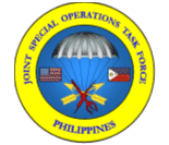 Abzeichen der Joint Special Operations Task Force - Philippines